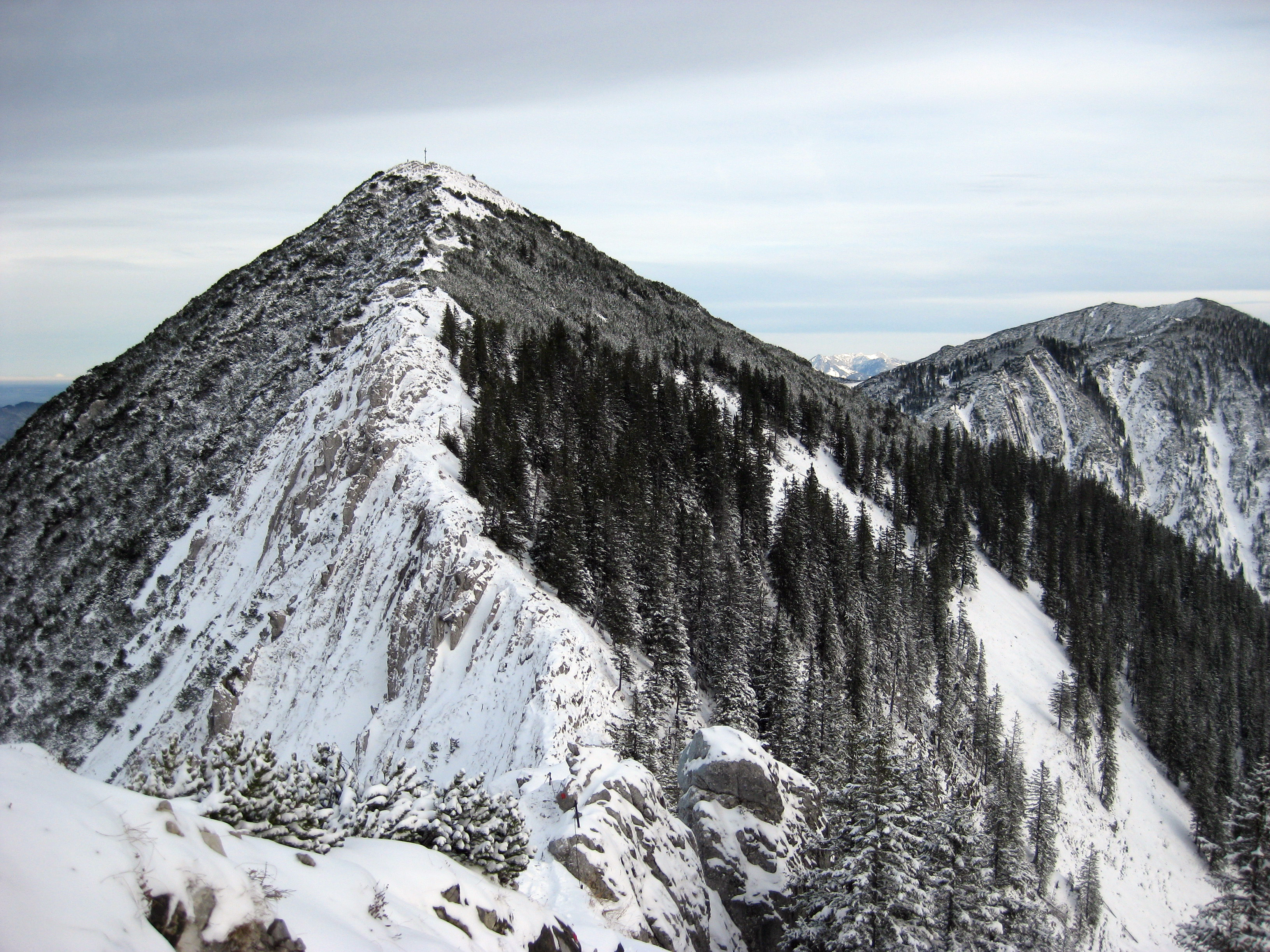 Brecherspitz